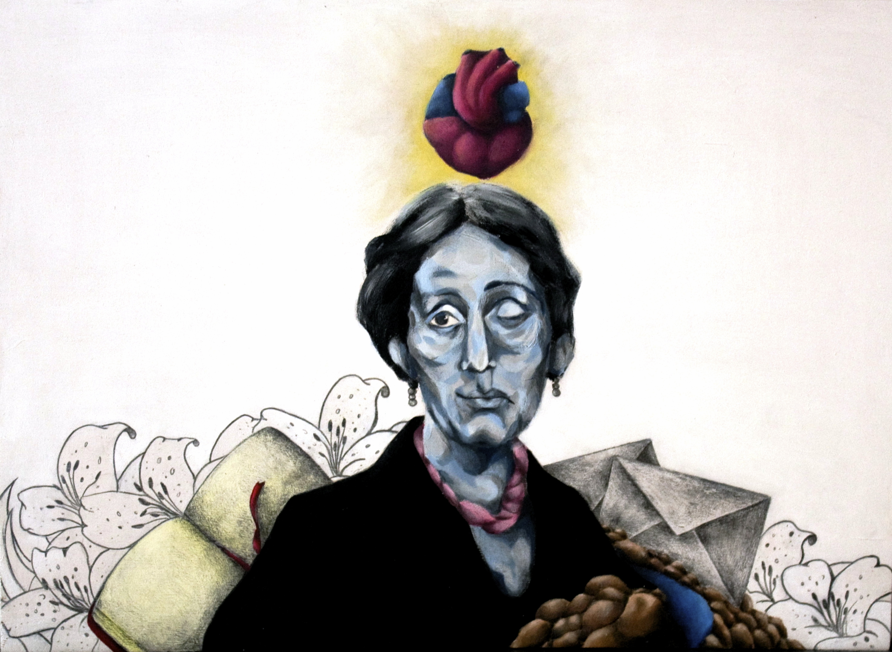 Técnica mixta